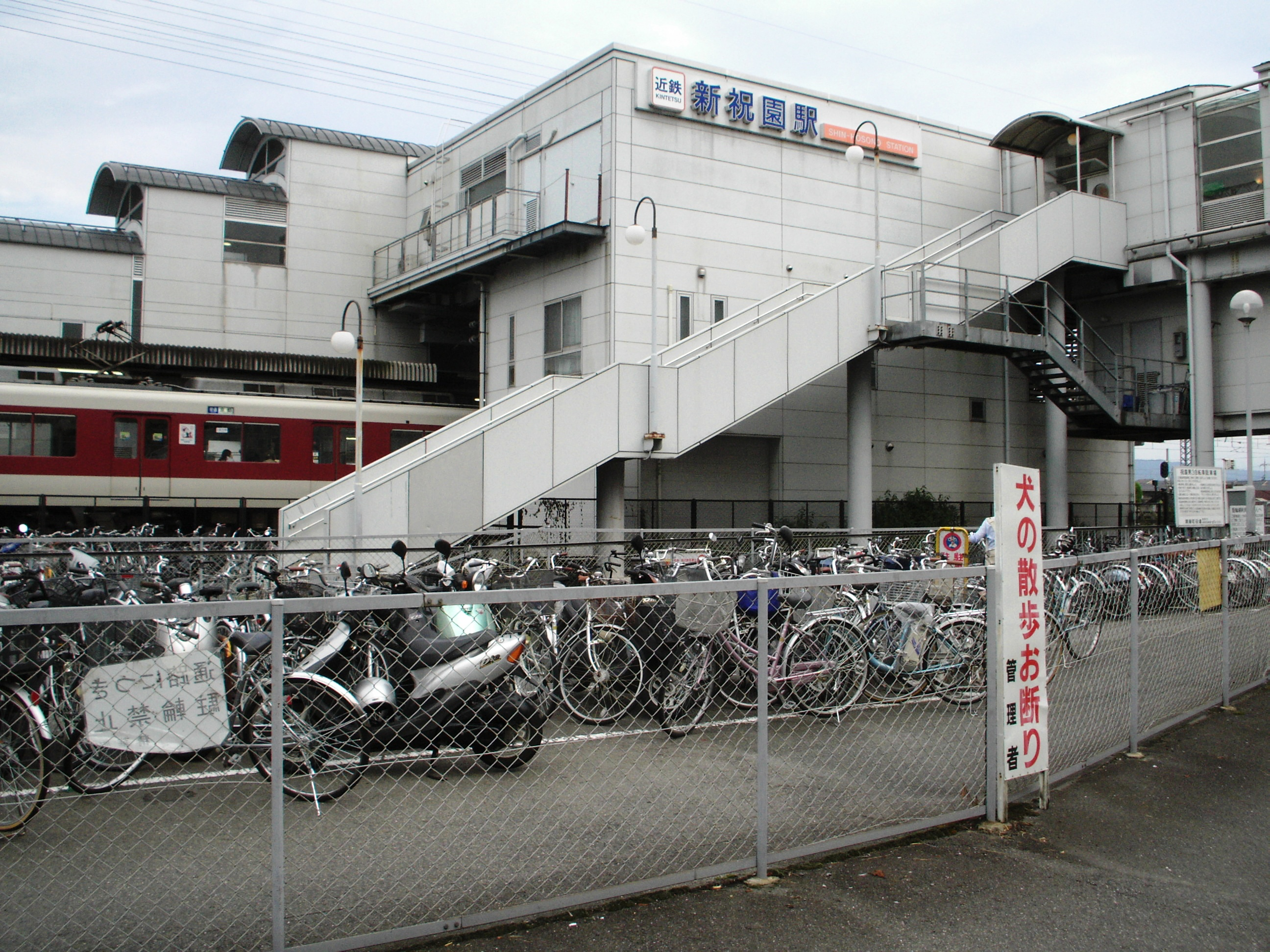 新祝園駅